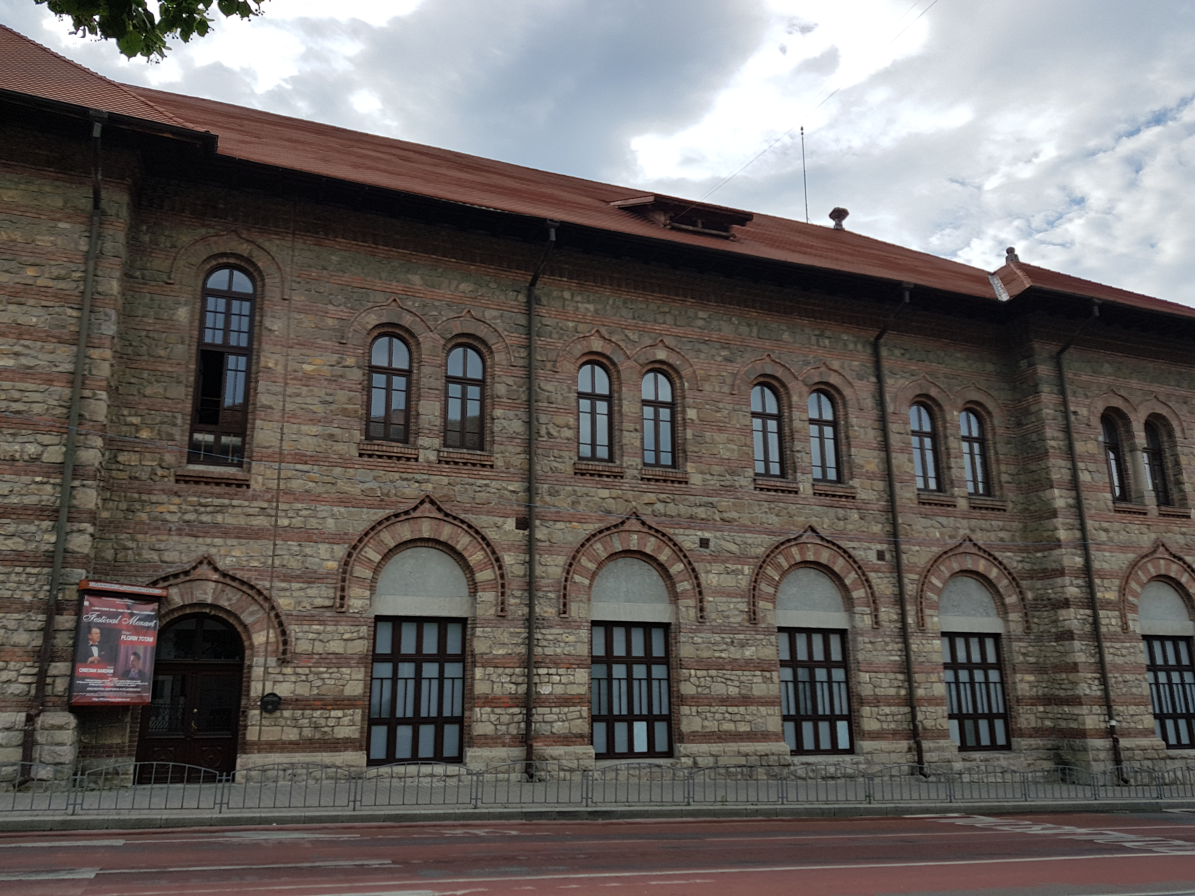 National College Alexandru Lahovari - Strada General Praporgescu 19, Râmnicu Vâlcea 240192, Románia